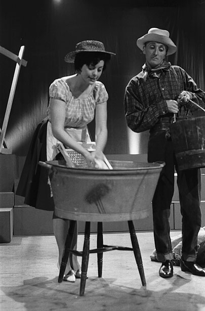 Teitl Cymraeg/Welsh title: Ryan Davies, Margaret Williams a Charles Williams yn difyrru. Ffotograffydd/Photographer: Geoff Charles (1909-2002) Dyddiad/Date: Awst/ August 8, 1967 Cyfrwng/Medium: Negydd ffilm / Film negative Cyfeiriad/Reference: (gcc23676) Rhif cofnod / Record no.: 006198089 Rhagor o wybodaeth am gasgliad Geoff Charles yn Llyfrgell Genedlaethol Cymru More information about the Geoff Charles Collection at the National Library of Wales Mae ffotograffau Geoff Charles hefyd yn rhan o Broject Europeana Libraries Geoff Charles' photographs also form part of the Europeana Libraries Project